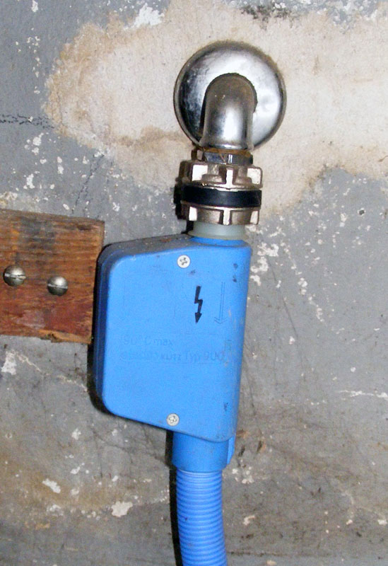 elektromechanischer Aquastop (auch: Wasserstop) an einer Spülmaschine. Im blauen Kasten befindet sich ein Magnetventil, das über die Waschmaschinensteuerung das Wasser direkt hinter dem Anschluß ein- und abschaltet. Der geriffelte Schlauch ist doppelwandig und beinhaltet den eigentlichen Druckwasserschlauch und die Elektroleitung zum Ventil. Sollte der innere Wasserschlauch platzen, gelangt Wasser in den äußeren Schlauch und gelangt in die Bodenwanne der Maschine. Mit einem Schwimmerventil wird das Wasserniveau in der Bodenwanne überwacht. Sollte durch eine undichtigkeit das Wasser eine gewisse Höhe erreichen, unterbricht der Schwimmerschalter den Stromzufuhr zum Magnetventil, der Wasserzufluss stoppt.